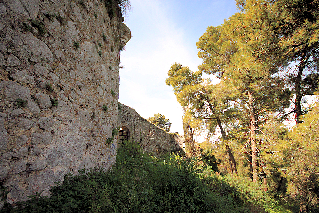 Κάστρο Βόνιτσας